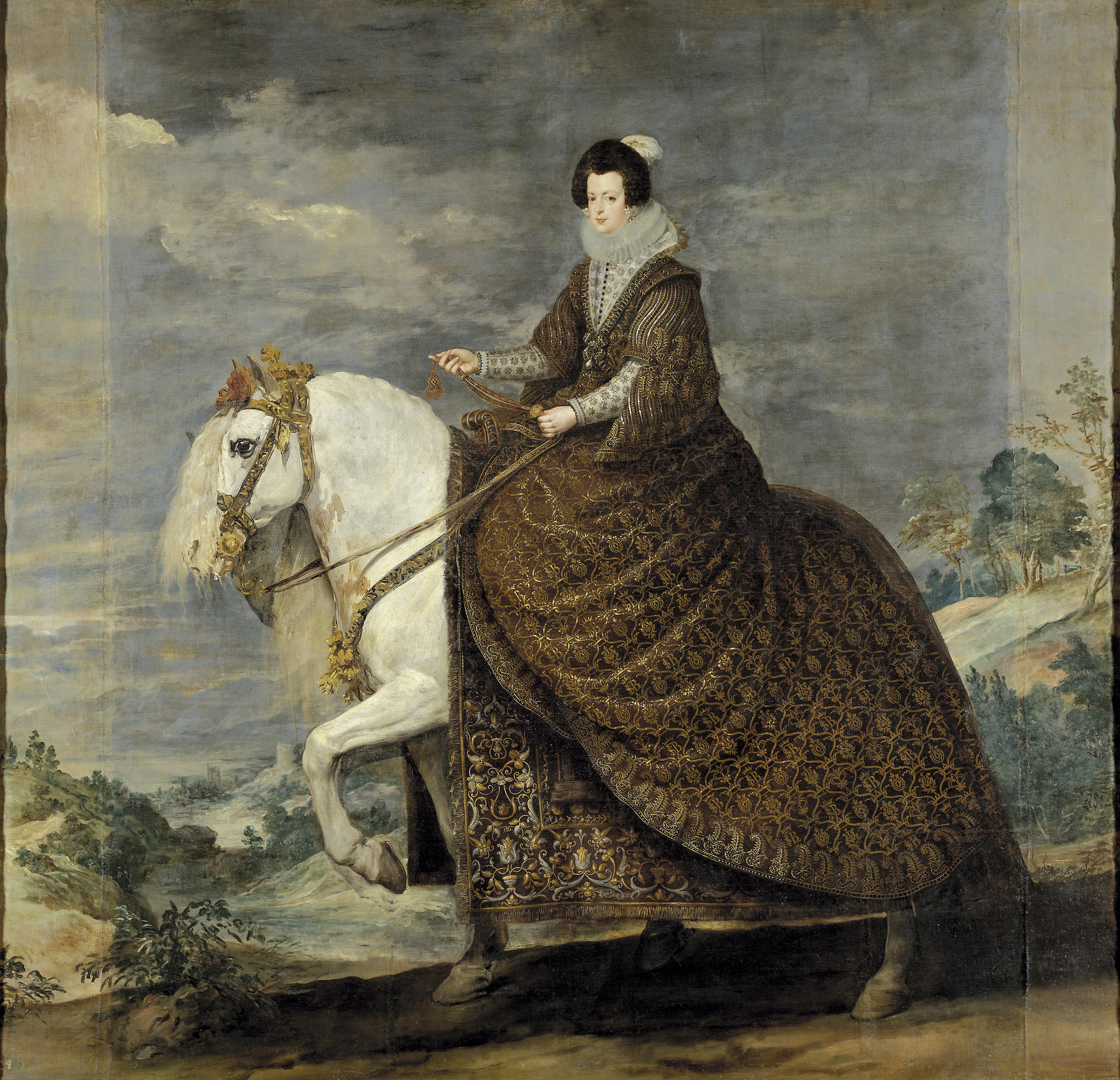 Retrato ecuestre de la reina Isabel de Borbón (1602-1644), que fue hija del rey Enrique IV de Francia y reina consorte de España por su matrimonio con el rey Felipe IV de España.